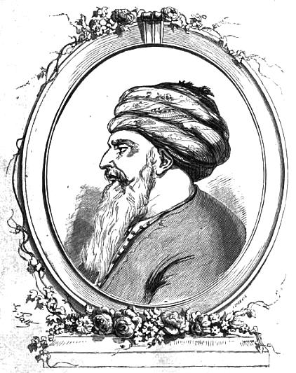 Le Dey d'Alger